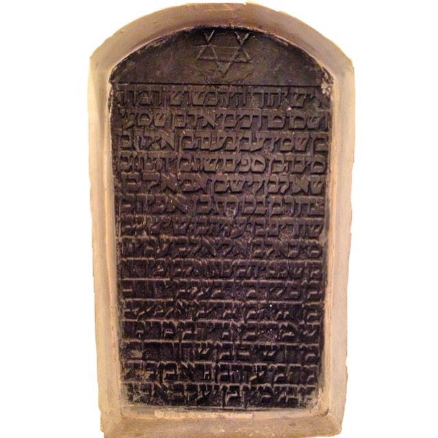 مقبره استر و مردخای